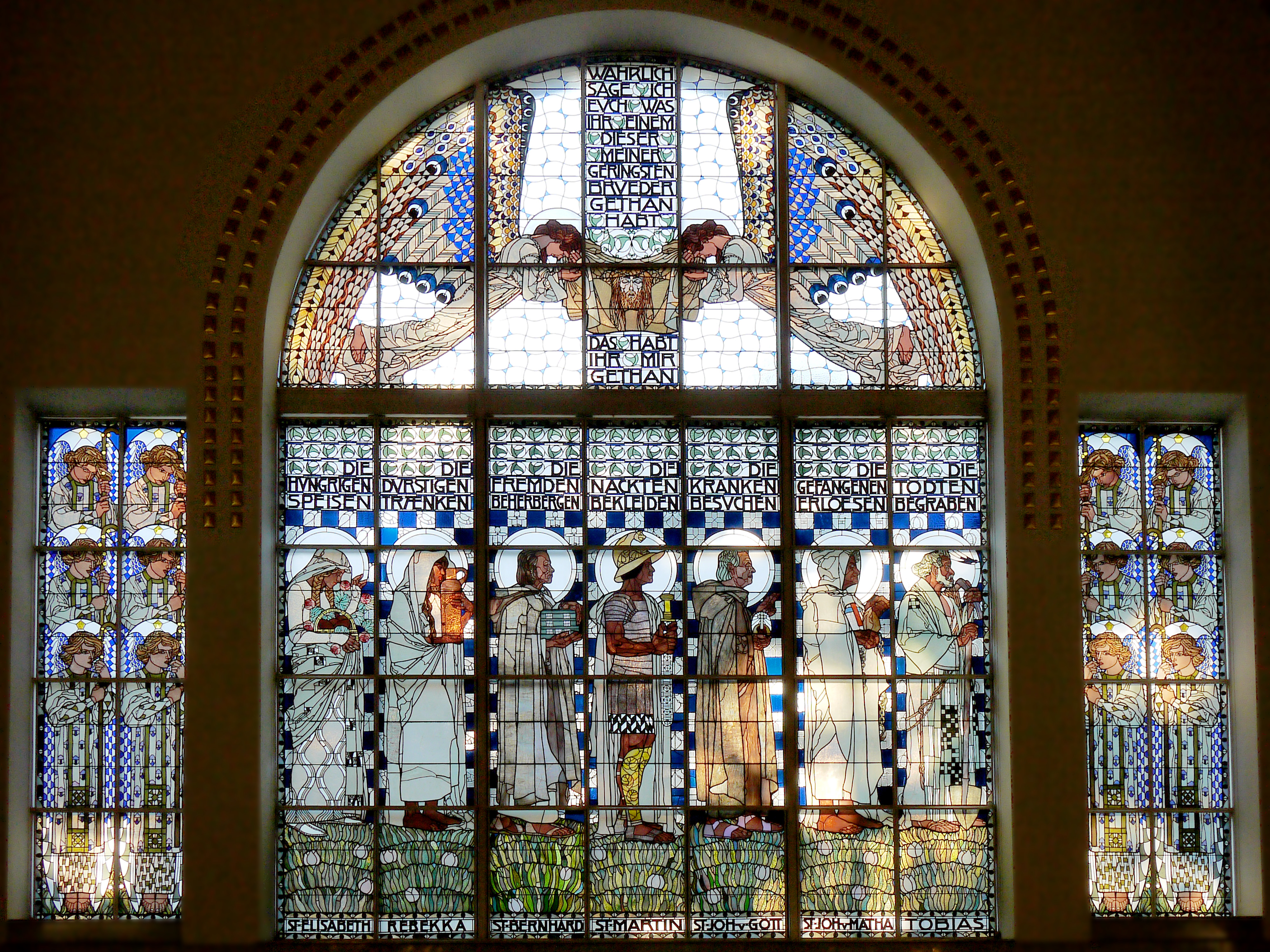 leibliche Tugenden